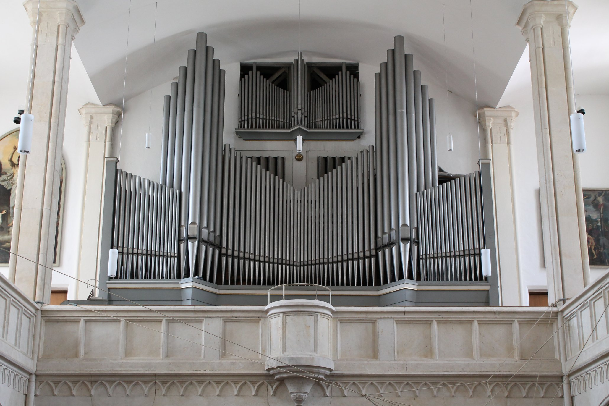 Steinmeyer-Orgel von St. Markus in München (1936, Steinmeyer op. 1620, III/36, 1949 erweitert auf III/54)